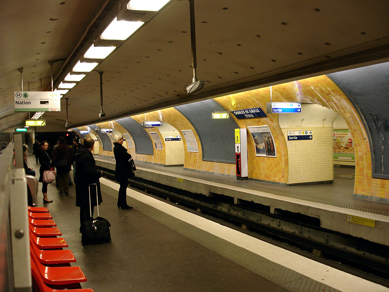 Station Étoile, de la ligne 6 du métro de Paris, France.